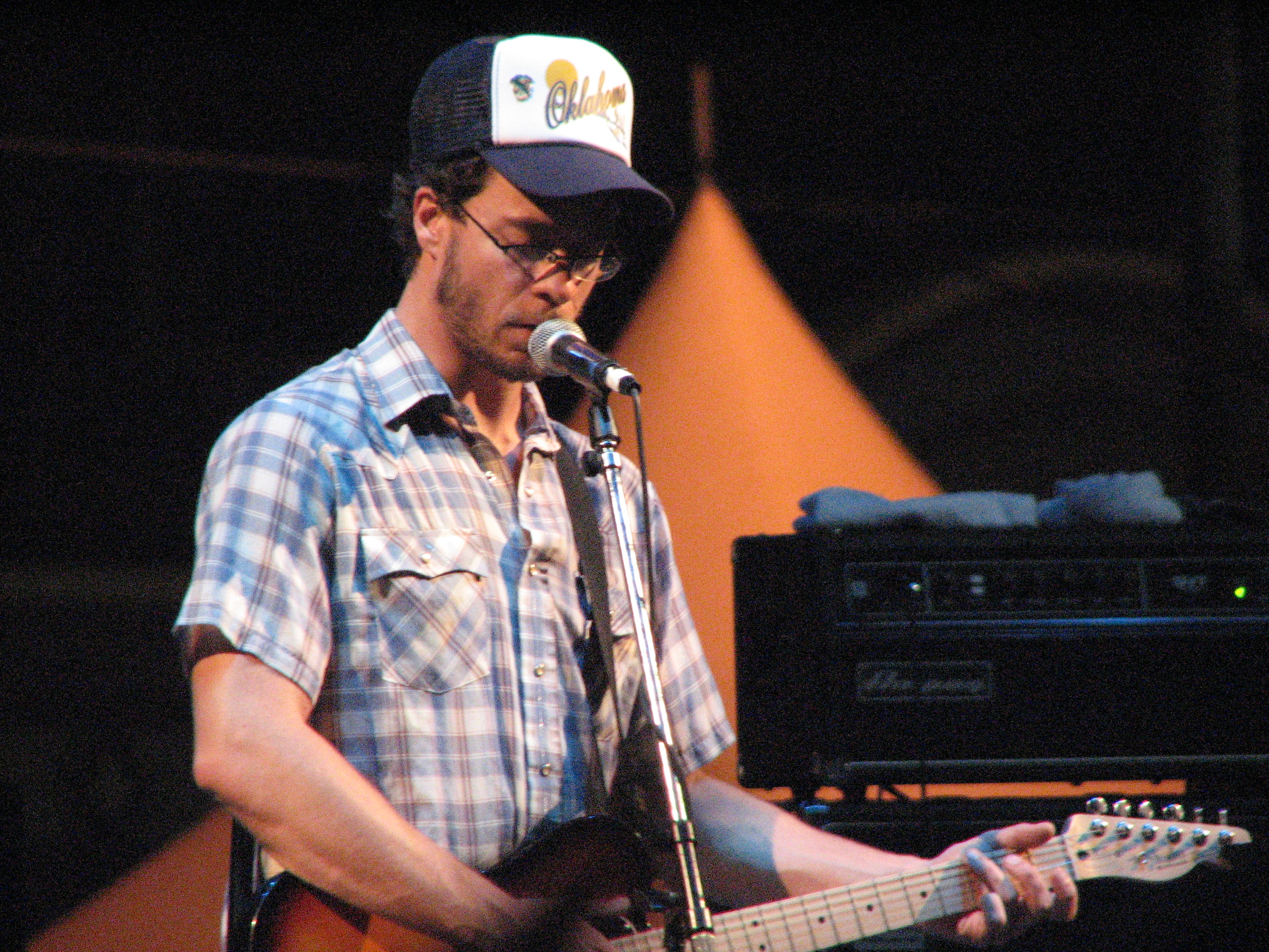 Amos Lee